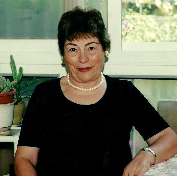 שושנה לנגרמן